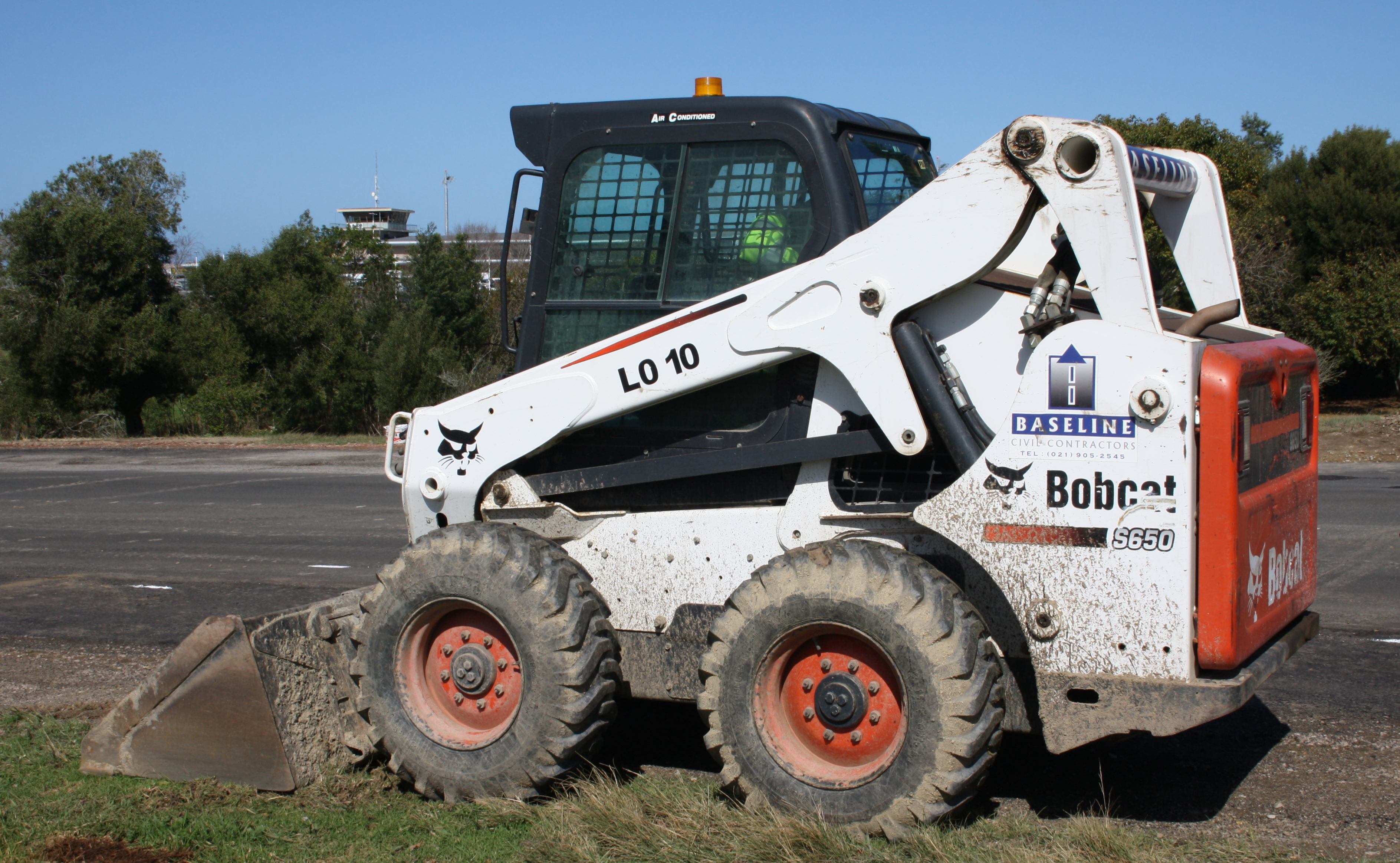 Bobcat S650 skid steer loader